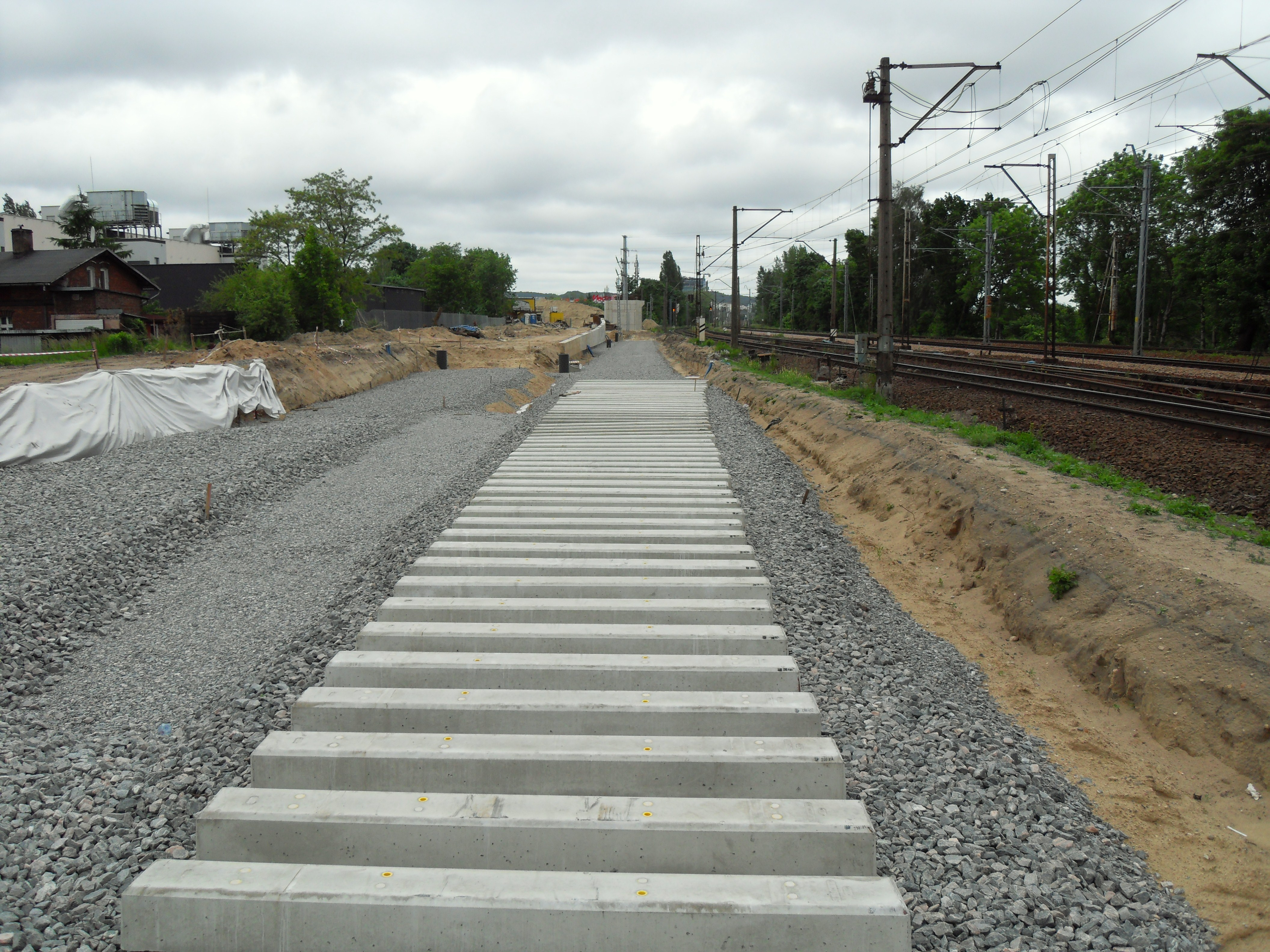 Gdańsk Strzyża, Pomorska Kolej Metropolitalna (PKM) wzdłuż al. Grunwaldzkiej w budowie, widok w kierunku północnym.